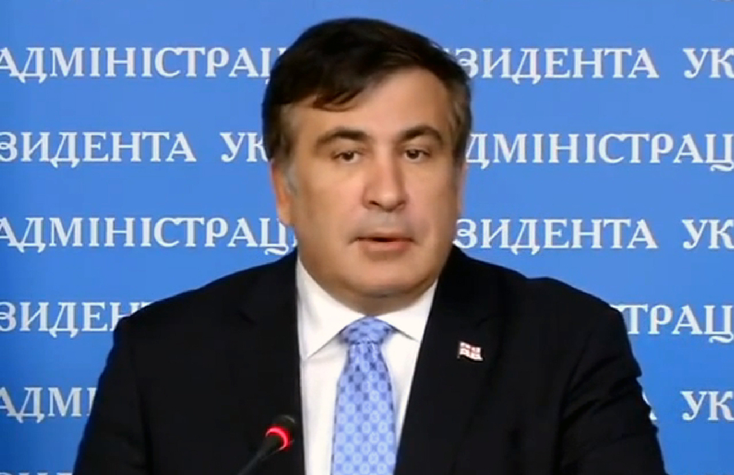 Міхеїл Саакашвілі, Голова Дорадчої міжнародної ради реформ при Президенті Петро Порошенко. Координує постачання Україні західної зброї.